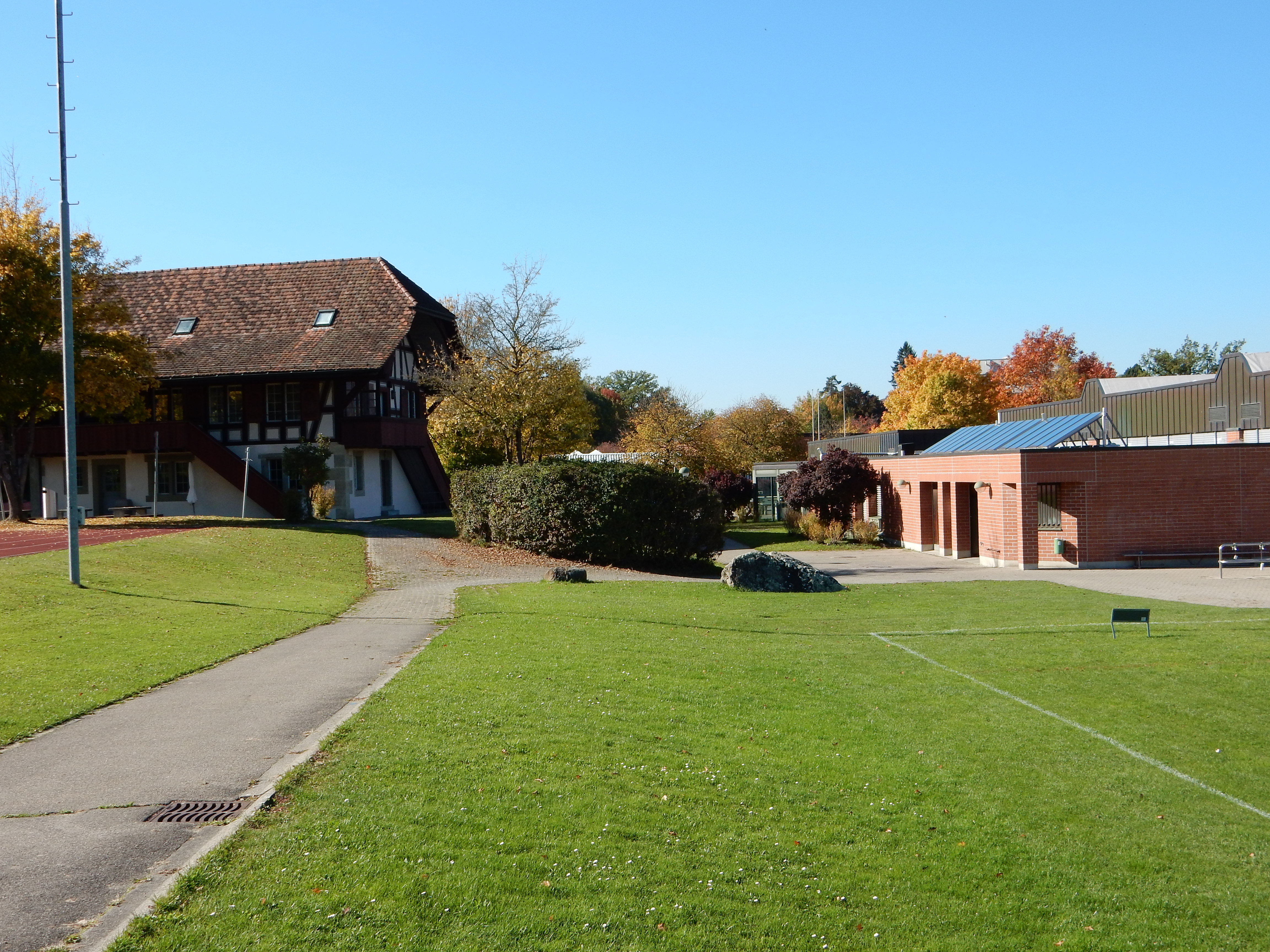 Gymnasium Lerbermatt (Köniz/Schweiz) von Osten gesehen